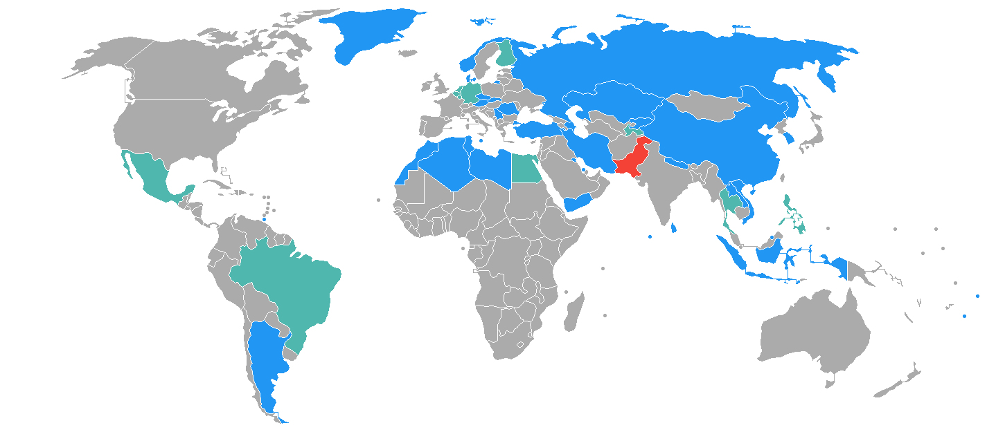 Visa policy of Pakistan for holders of diplomatic or service category passports Pakistan Visa free access for diplomatic and service category passports Visa free access for diplomatic passports